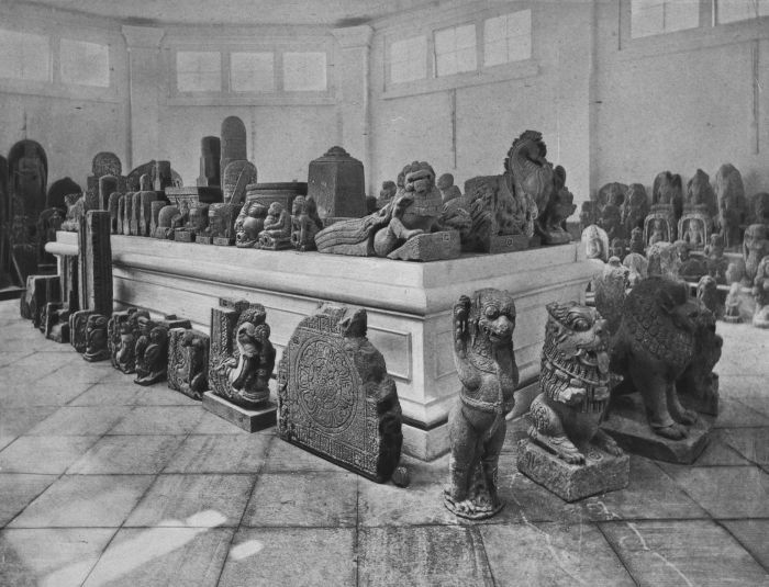 Fotomechanische druk. Een zaal in het museum van het Koninklijk Bataviaasch Genootschap van Kunsten en Wetenschappen, Batavia